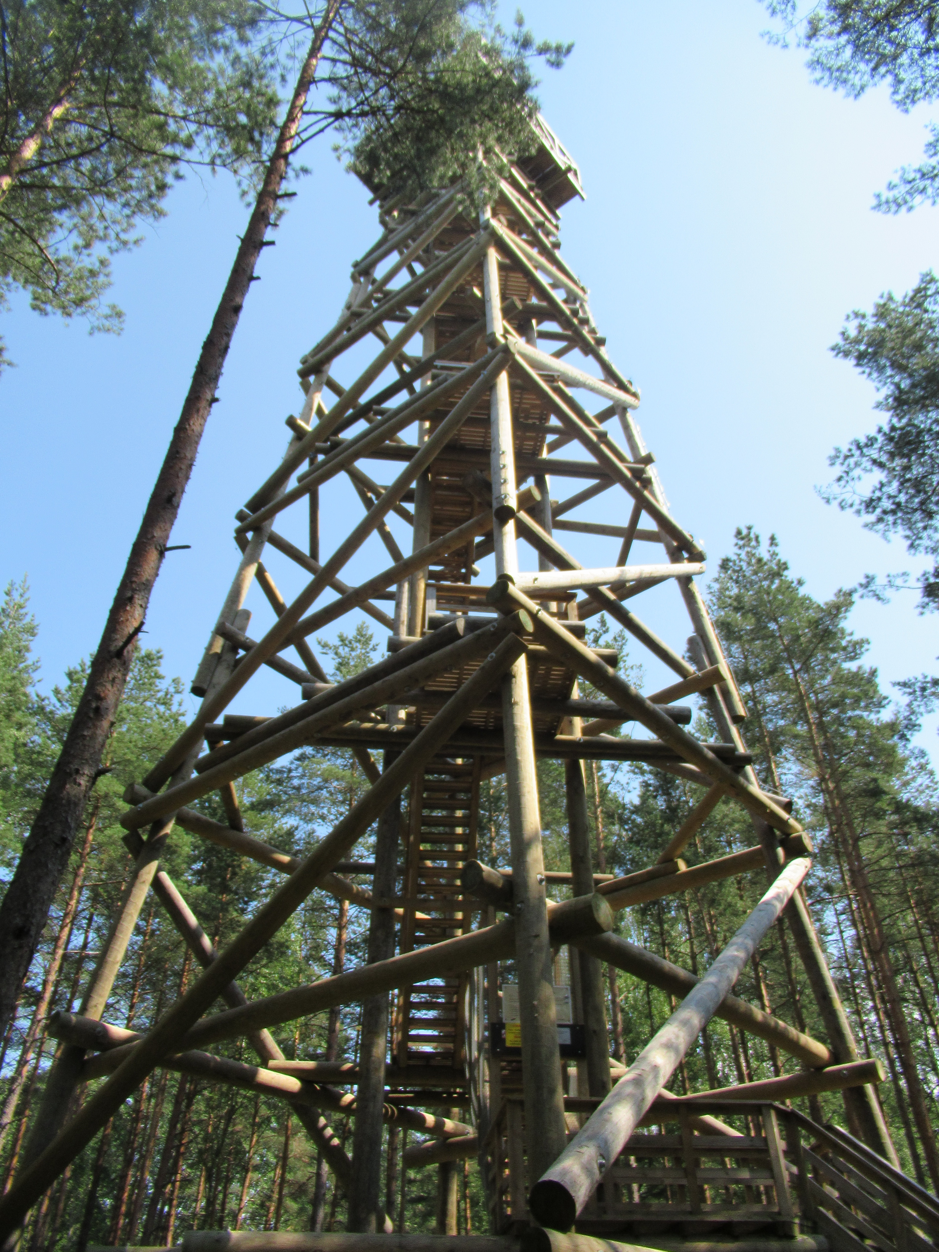 Bumbu kalniņa skatu tornis